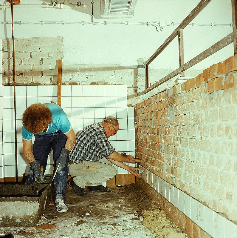 Original image description from the Deutsche FotothekFliesenleger